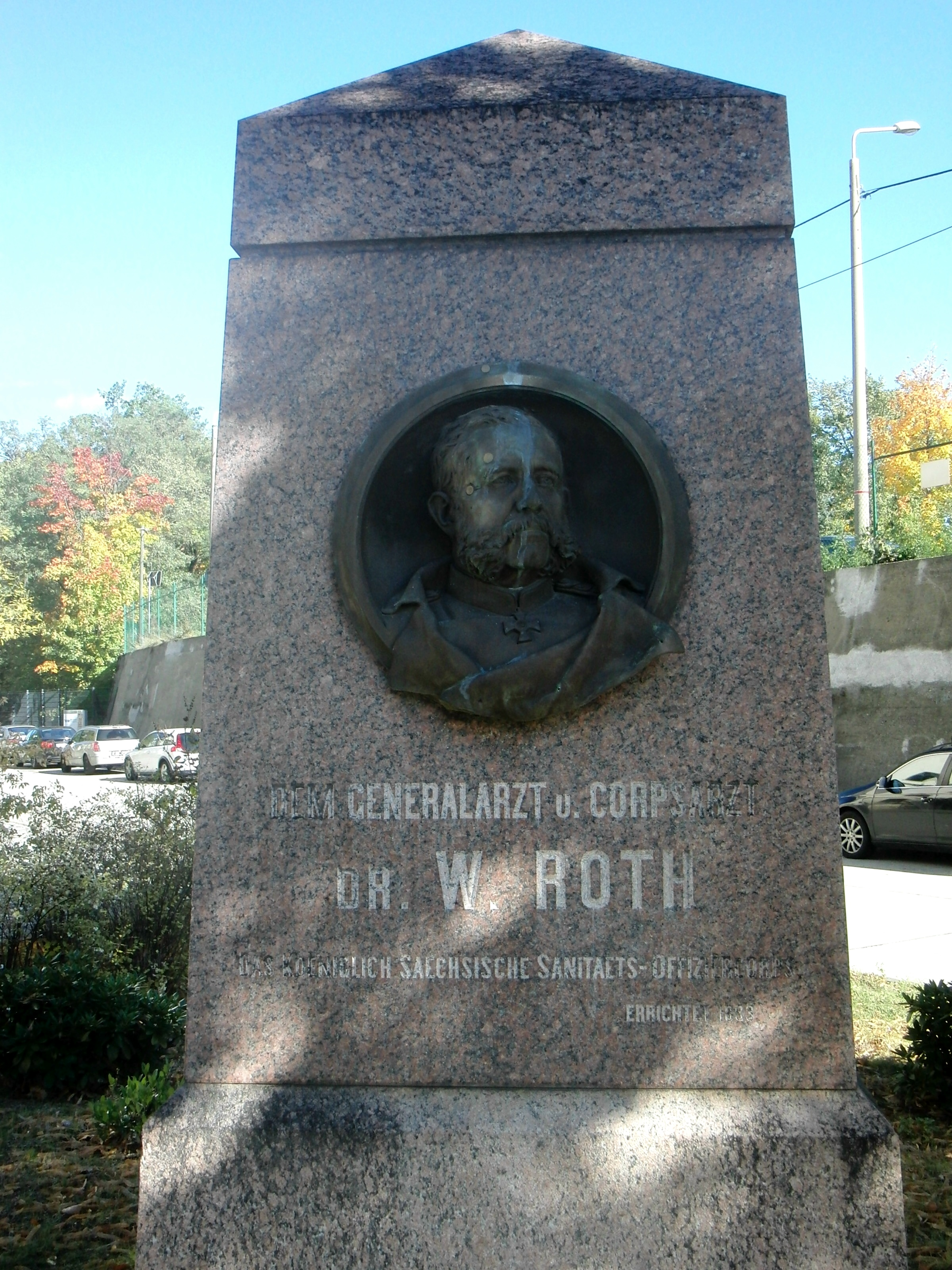 Dresden Albertstadtkaserne, Dr.-W.A.Roth-Denkmal wurde ihm zu Ehren als Militärarzt für besondere militärische Gesundheitspflege und Militärhygiene im Foyer des ehemaligen Militärlazarett 1893 an der Marienallee errichtet.